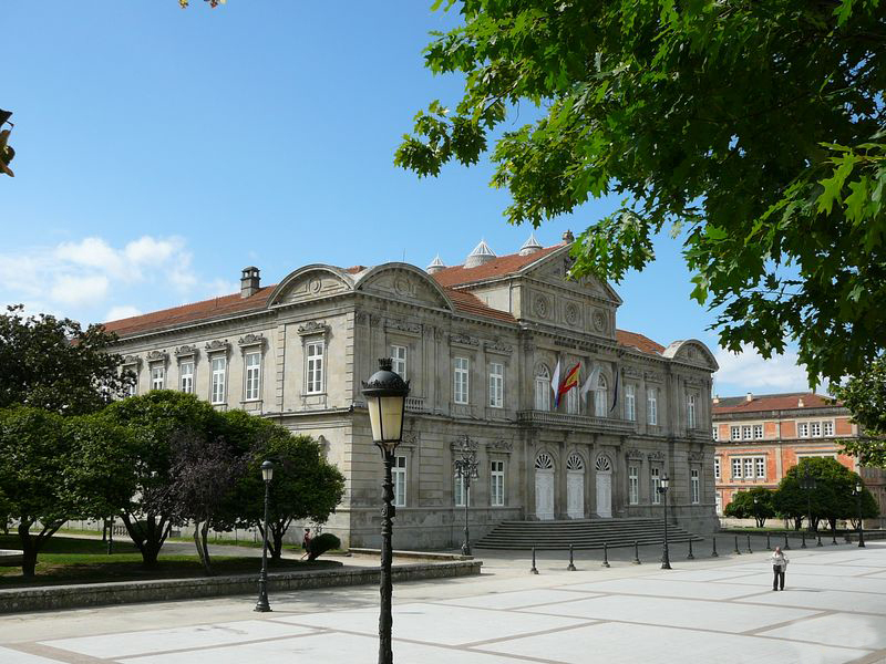 Deputación de Pontevedra